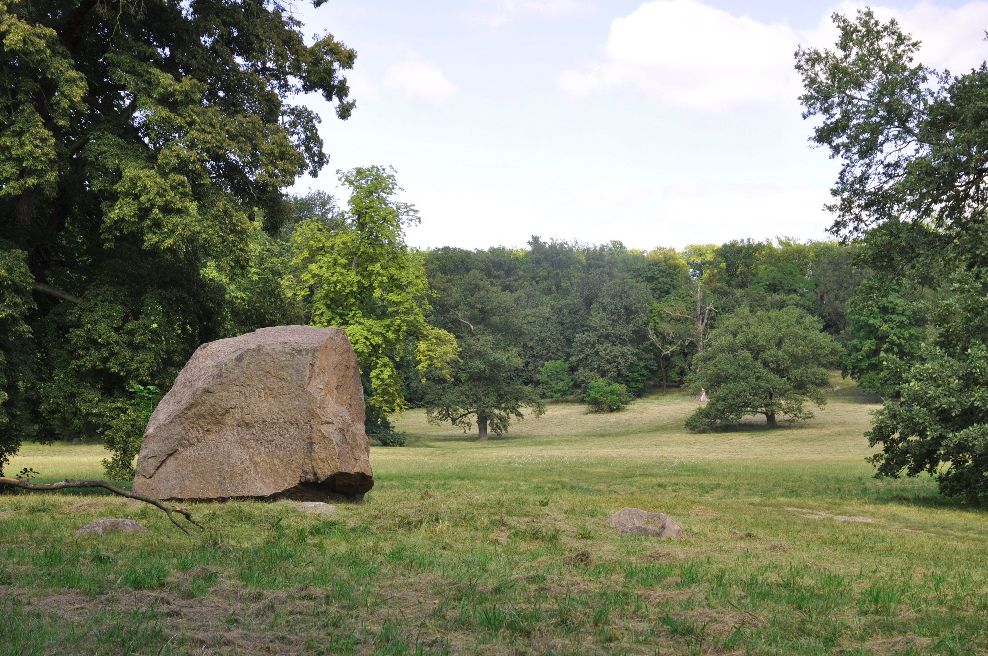 Der Kaufdatums-Findling am Großen Wiesengrung im Park Klein-Glienicke